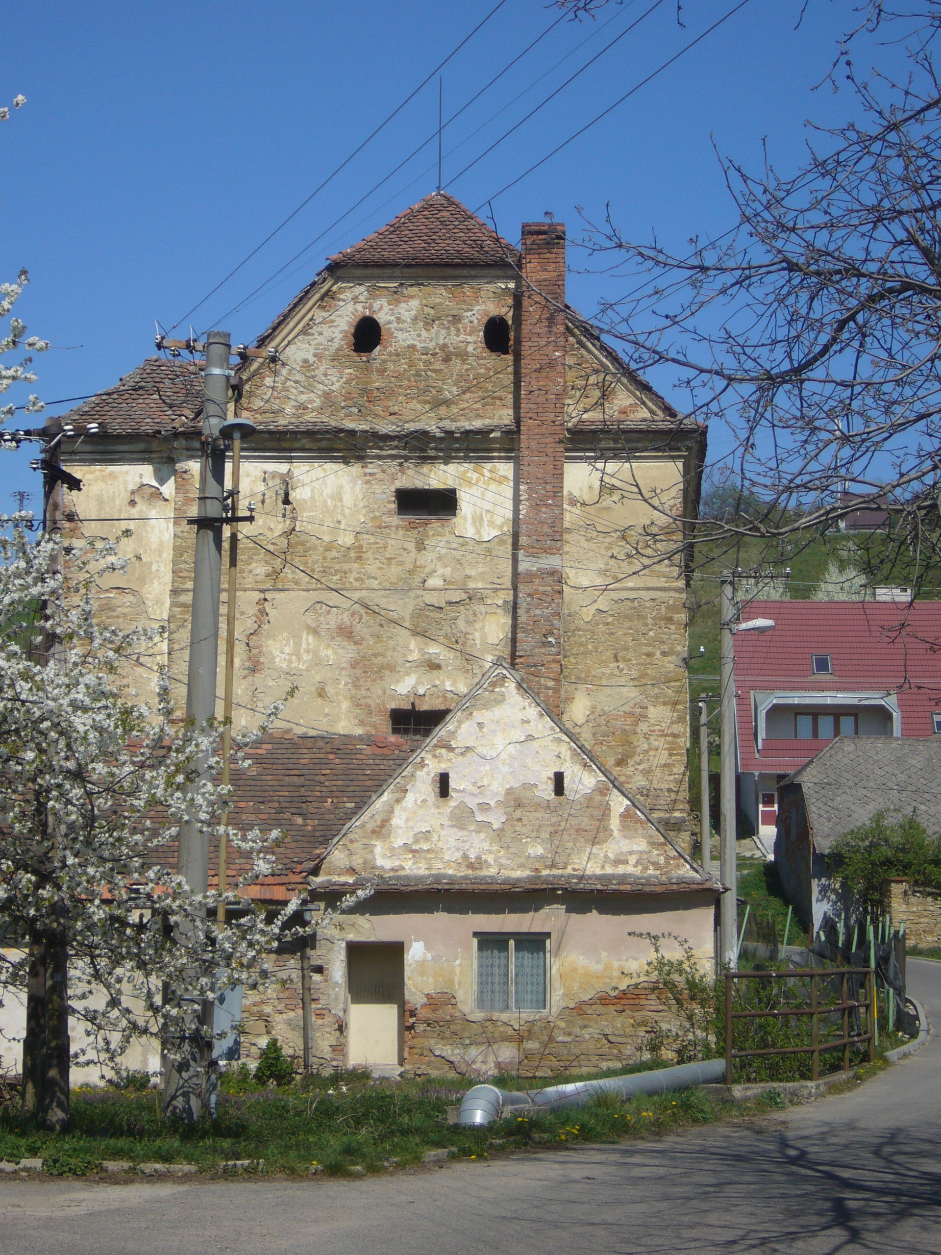 Uliční průčelí tvrze, bývalého zámečku v obci. Současný stav je z velké části výsledkem 40 let plánovaného hospodářství, kdy byla tvrz i s hospodářským dvorem původním majitelům zabavena a v prostorách dvora byla zřízena výkrmna prasat. Po roce 1989 se komplex vrátil původním vlastníkům. Komplex by potřeboval nutně rekonstrukci, na kterou ale nejsou peníze ani ze strany obce ani vlastníků.